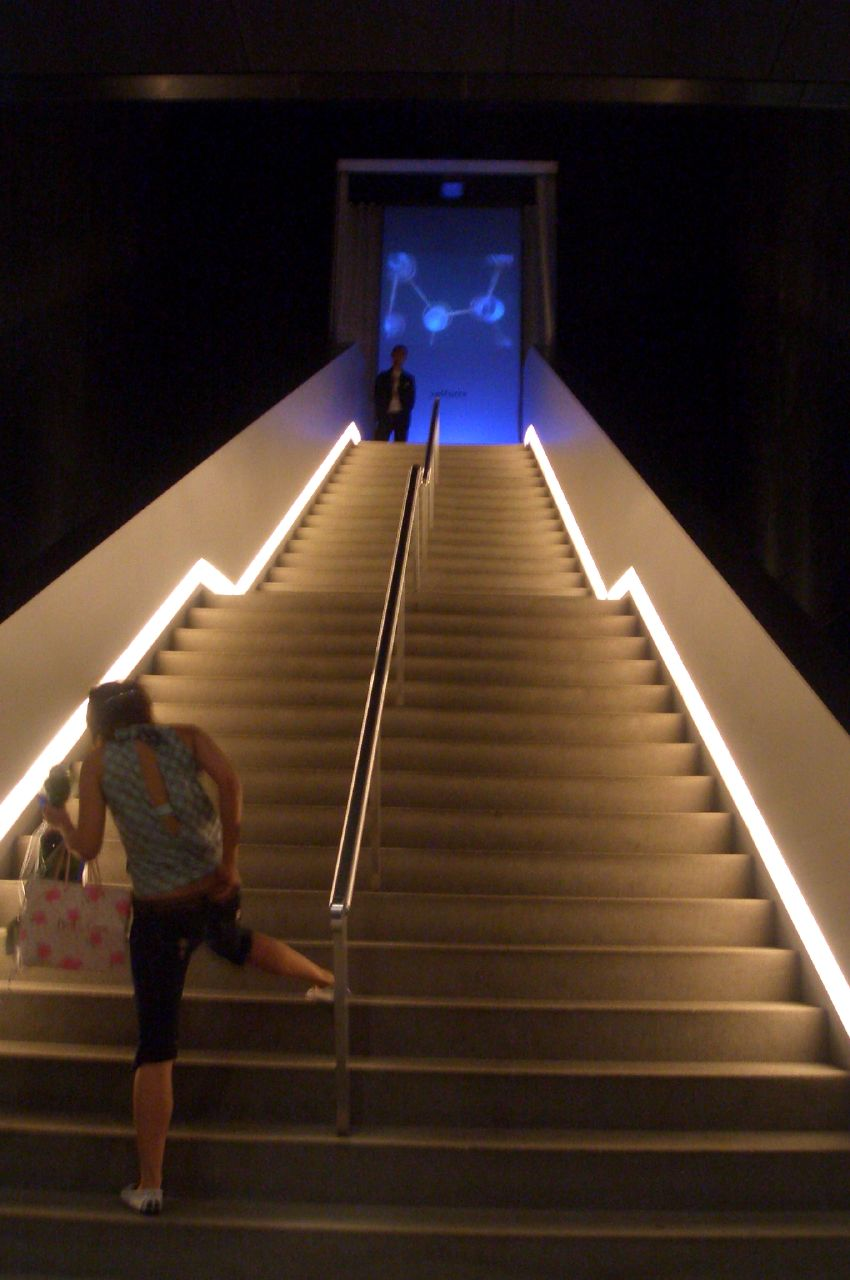 Velfarre, Roppongi (closed in 2007)